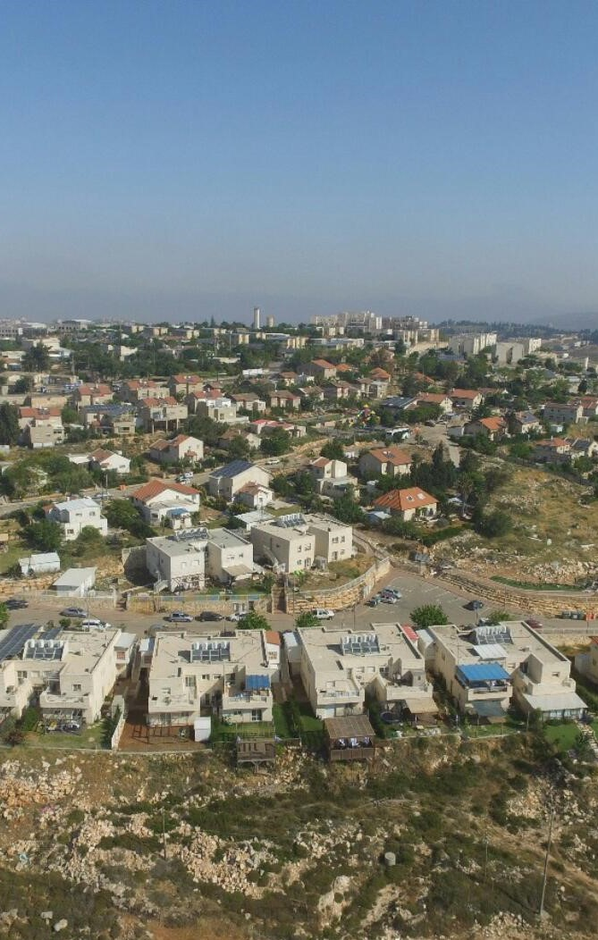 תצלום אוויר של הישוב הר ברכה